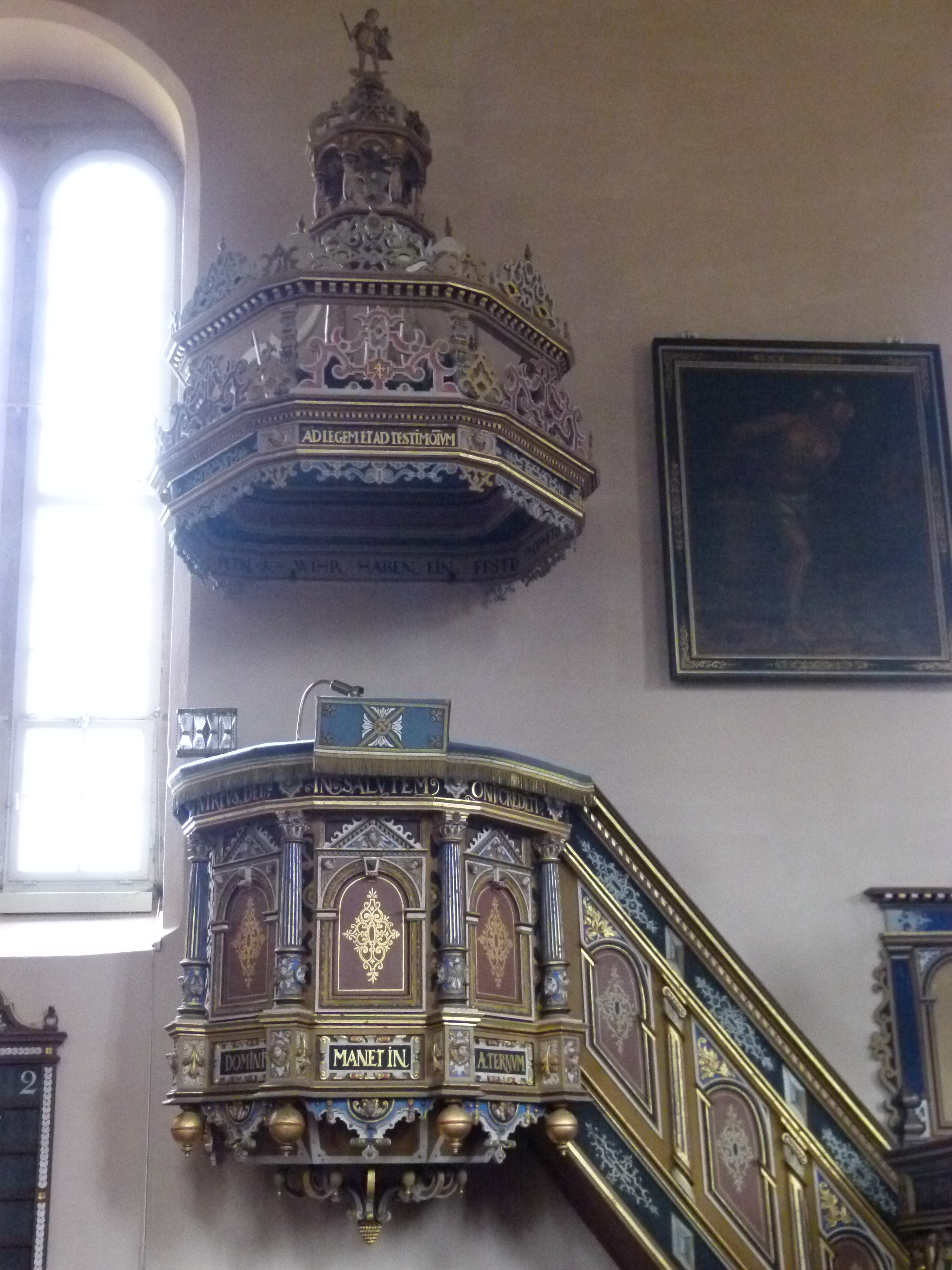 Kanzel der St.-Georg-Christophorus-Jodokus-Kirche in Stellichte